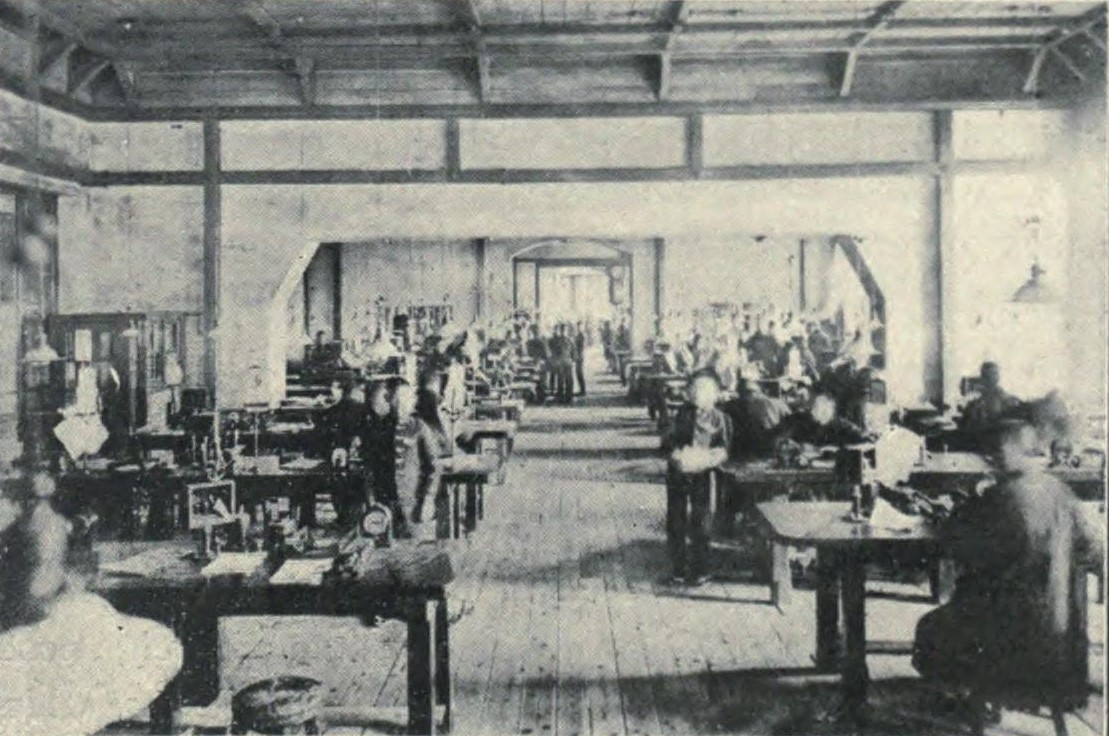 東京中央郵便局の電信室